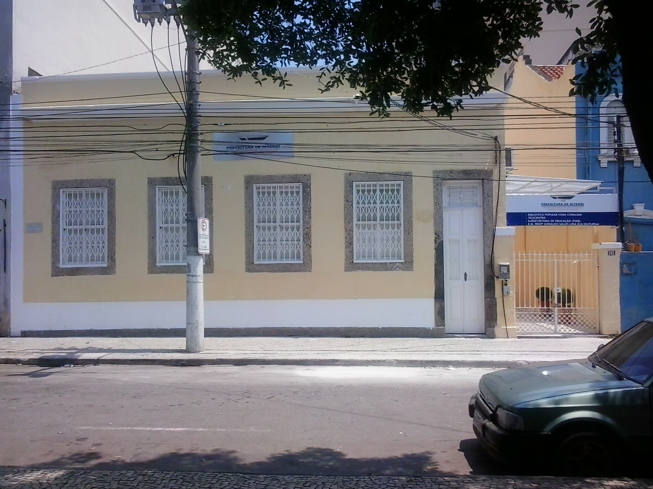 Fundação de Educação de Niterói